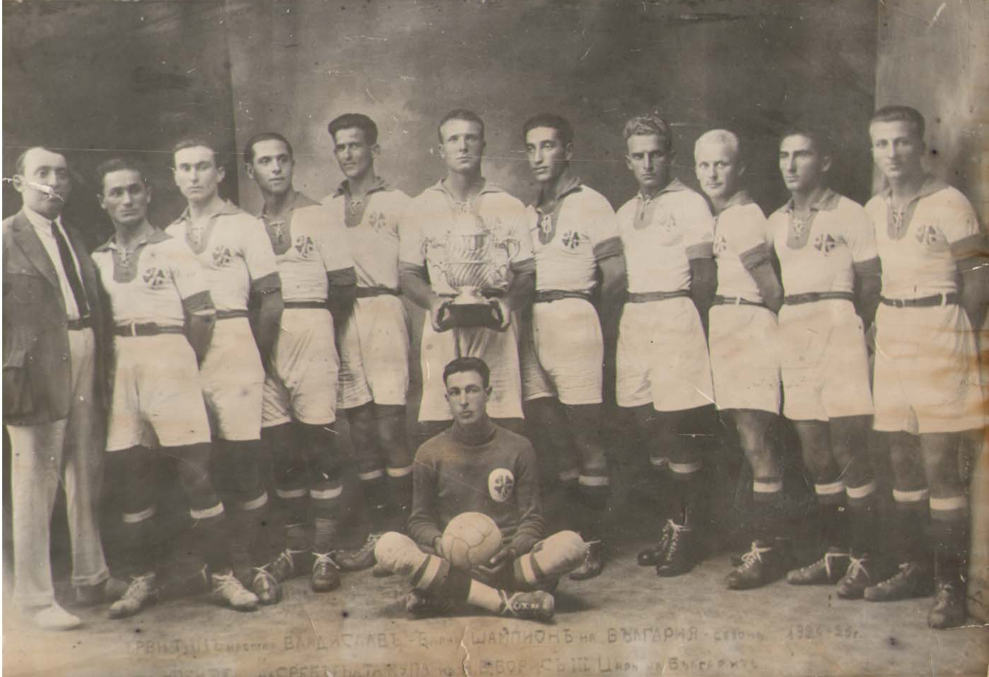 Владислав Варна-Шампион на България 1924/25г.